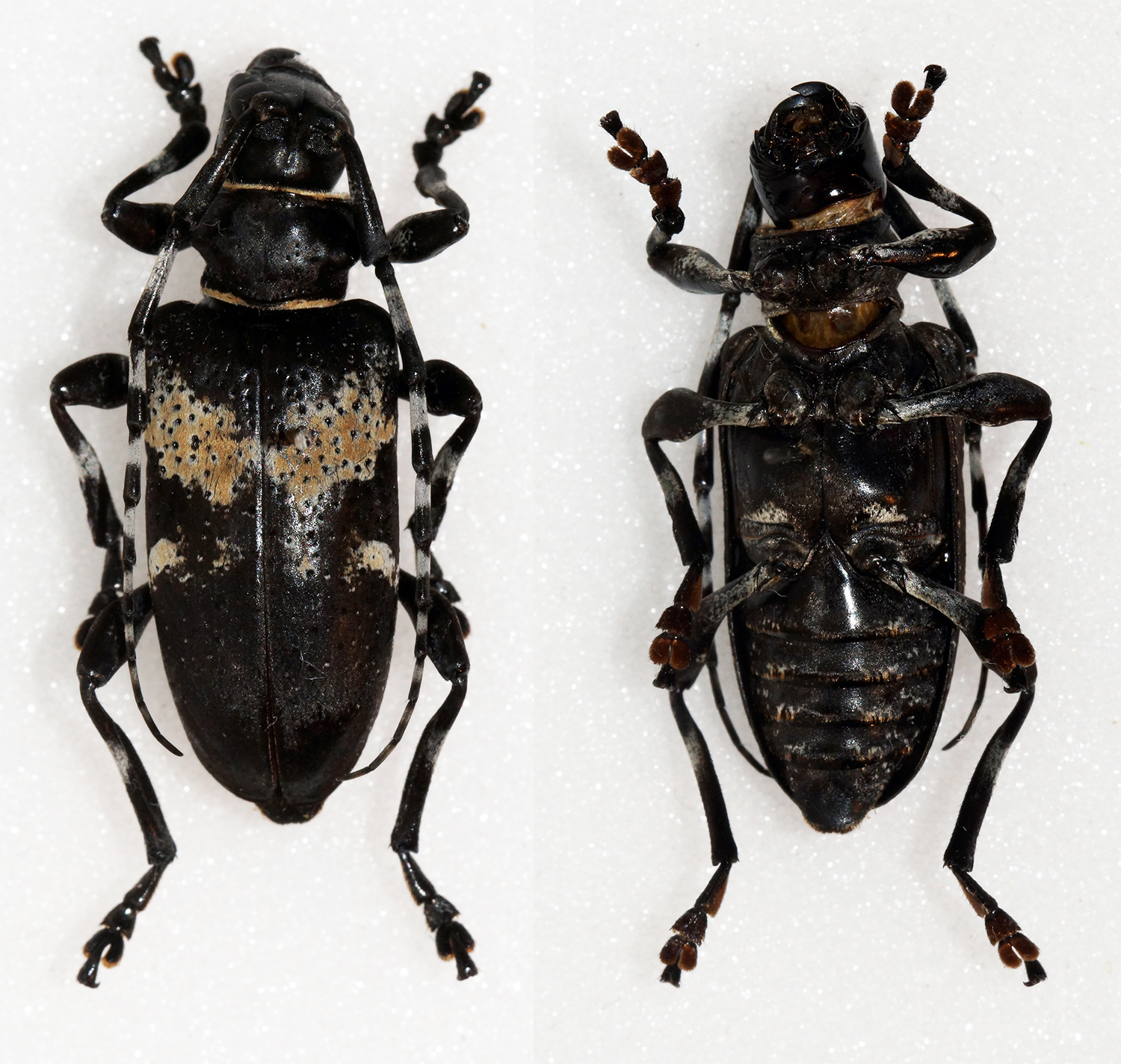 LeConte,1873 Sex: Male Data: 17-07-14 - Madera Canyon - Santa Cruz County - Arizona - USA Size: 26mm